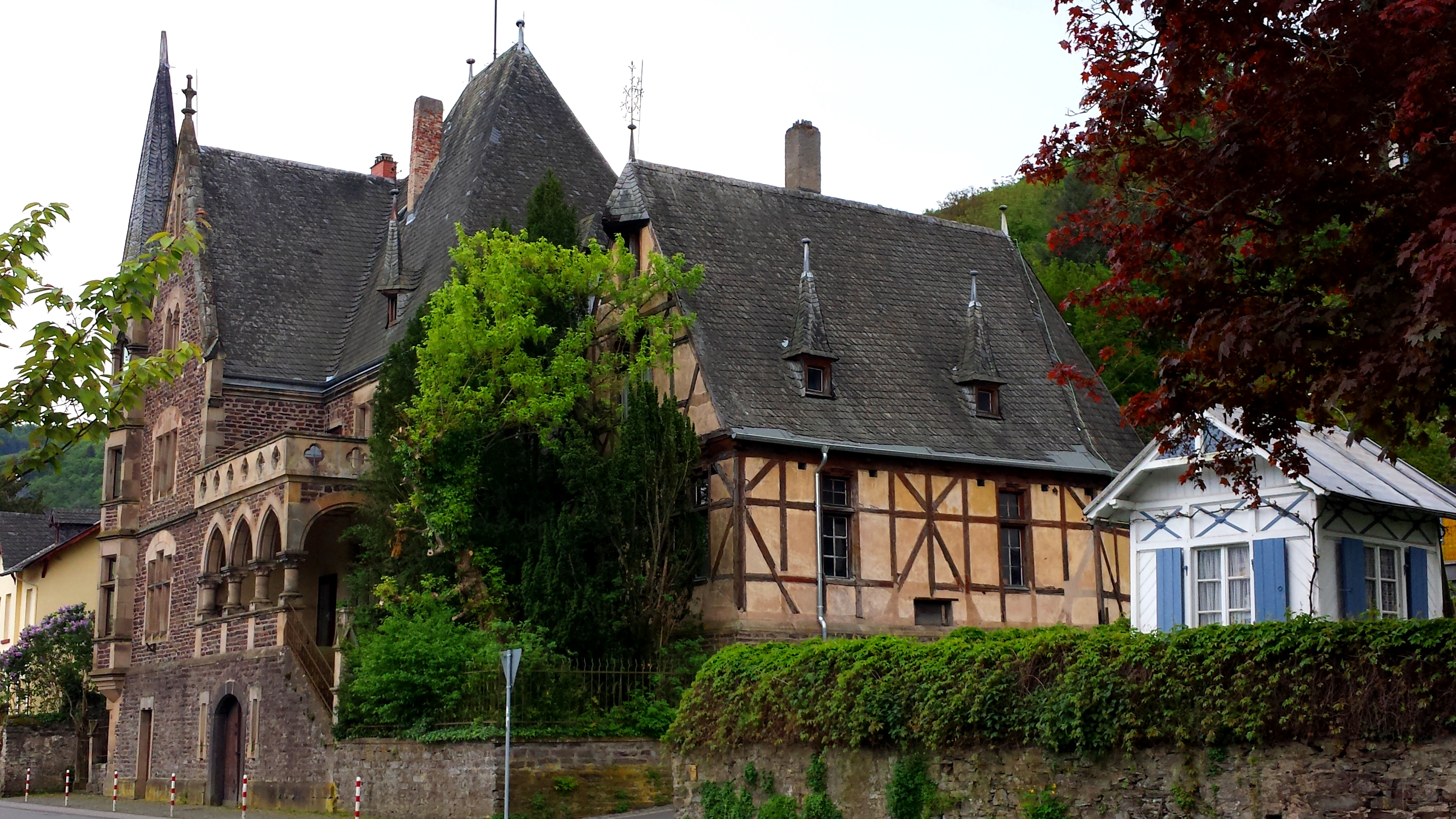 Weingut